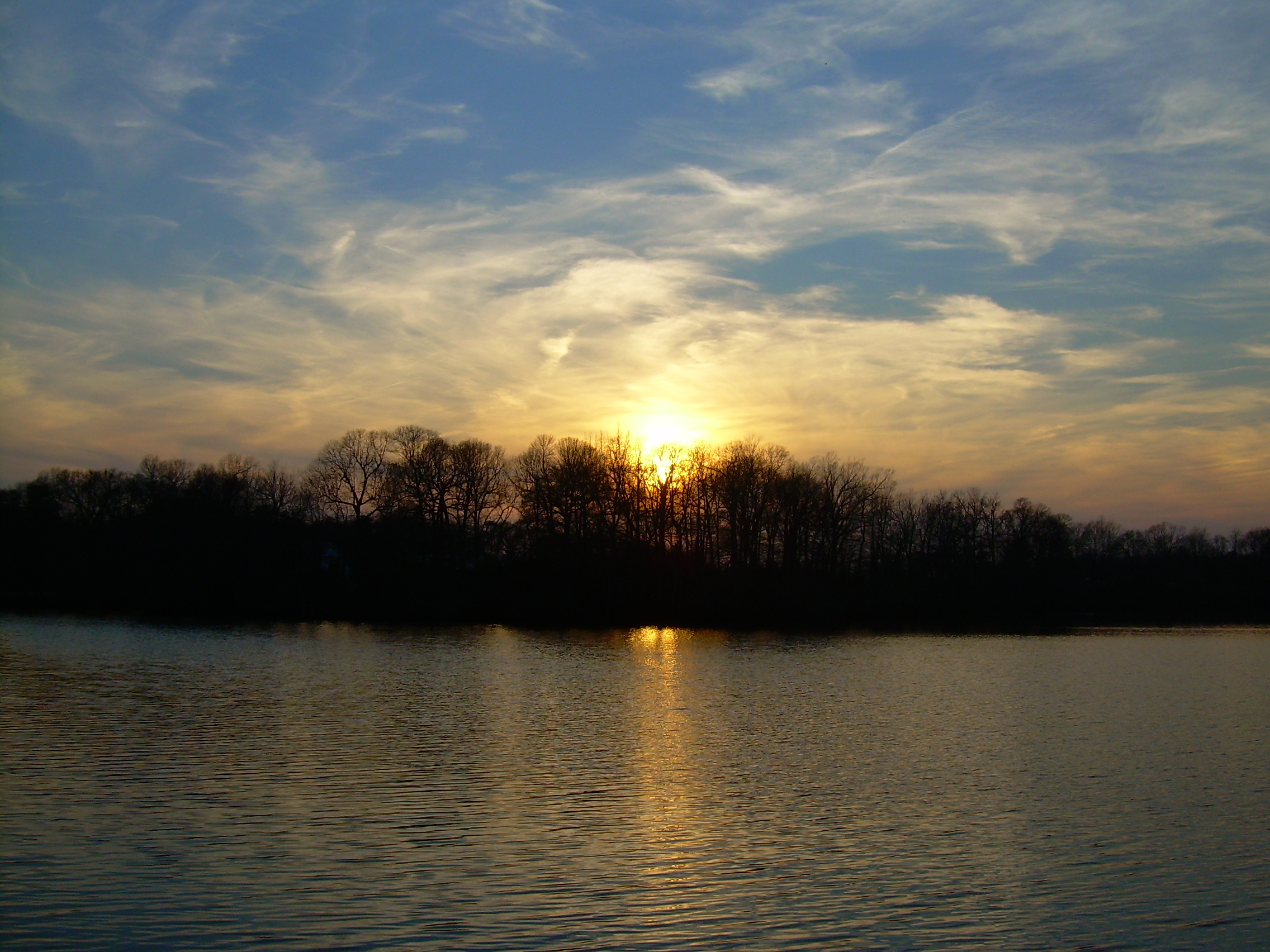 Sunset over Blairs Pond